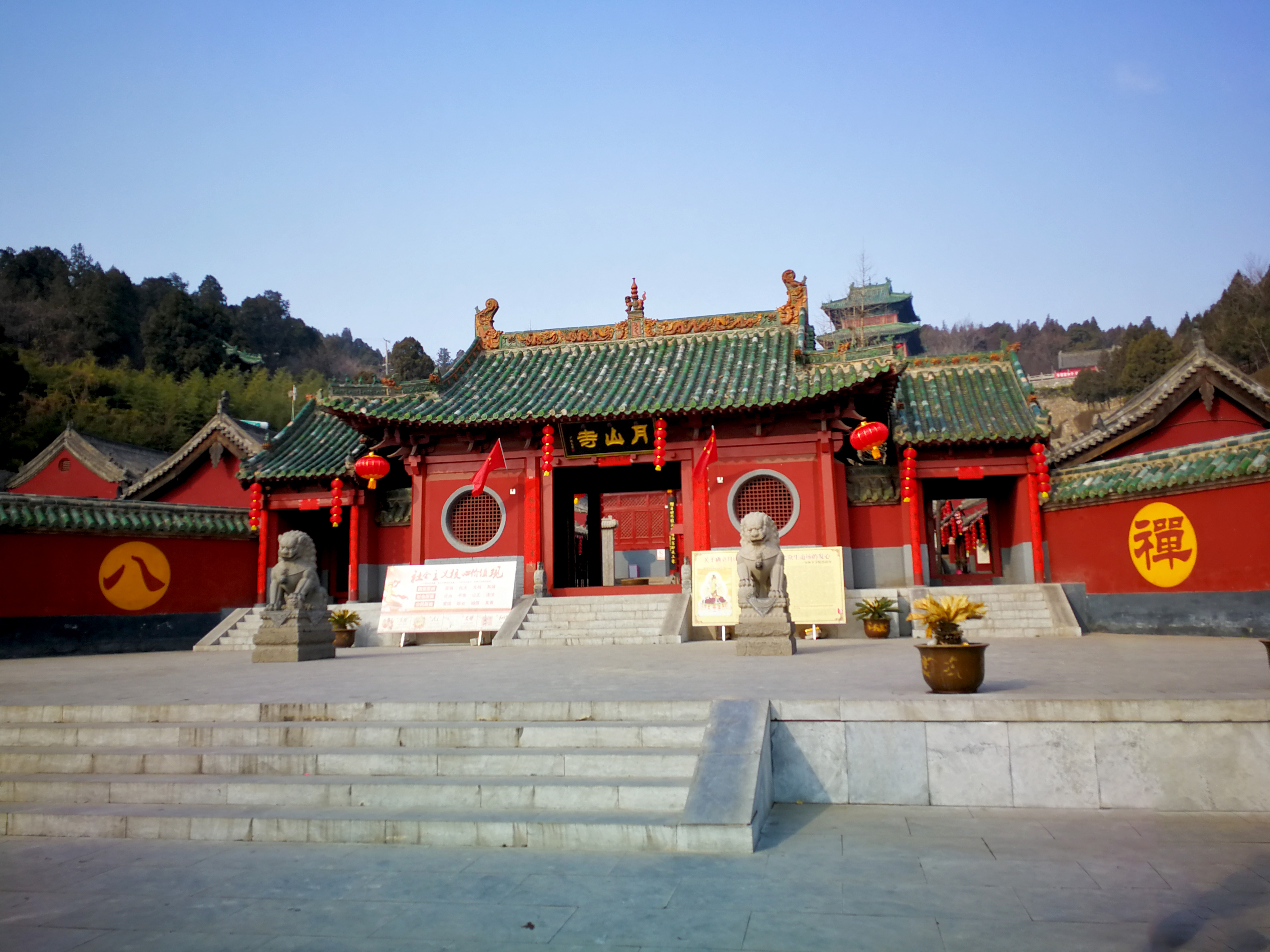 月山寺 寺门